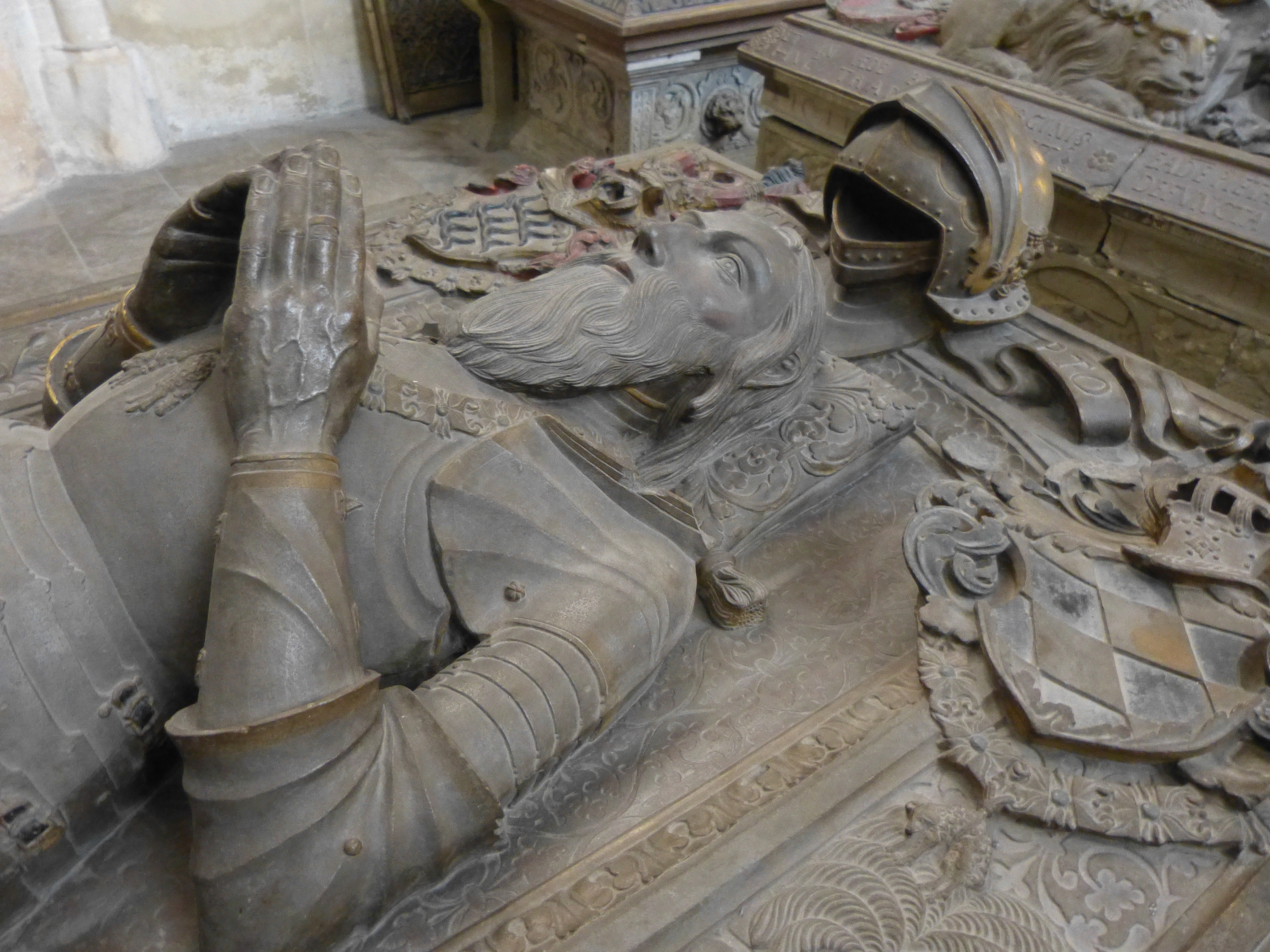 Stiftskirche Tübingen. Grablege im Chor. Grabmal des Herzogs Eberhard im Bart von Württemberg